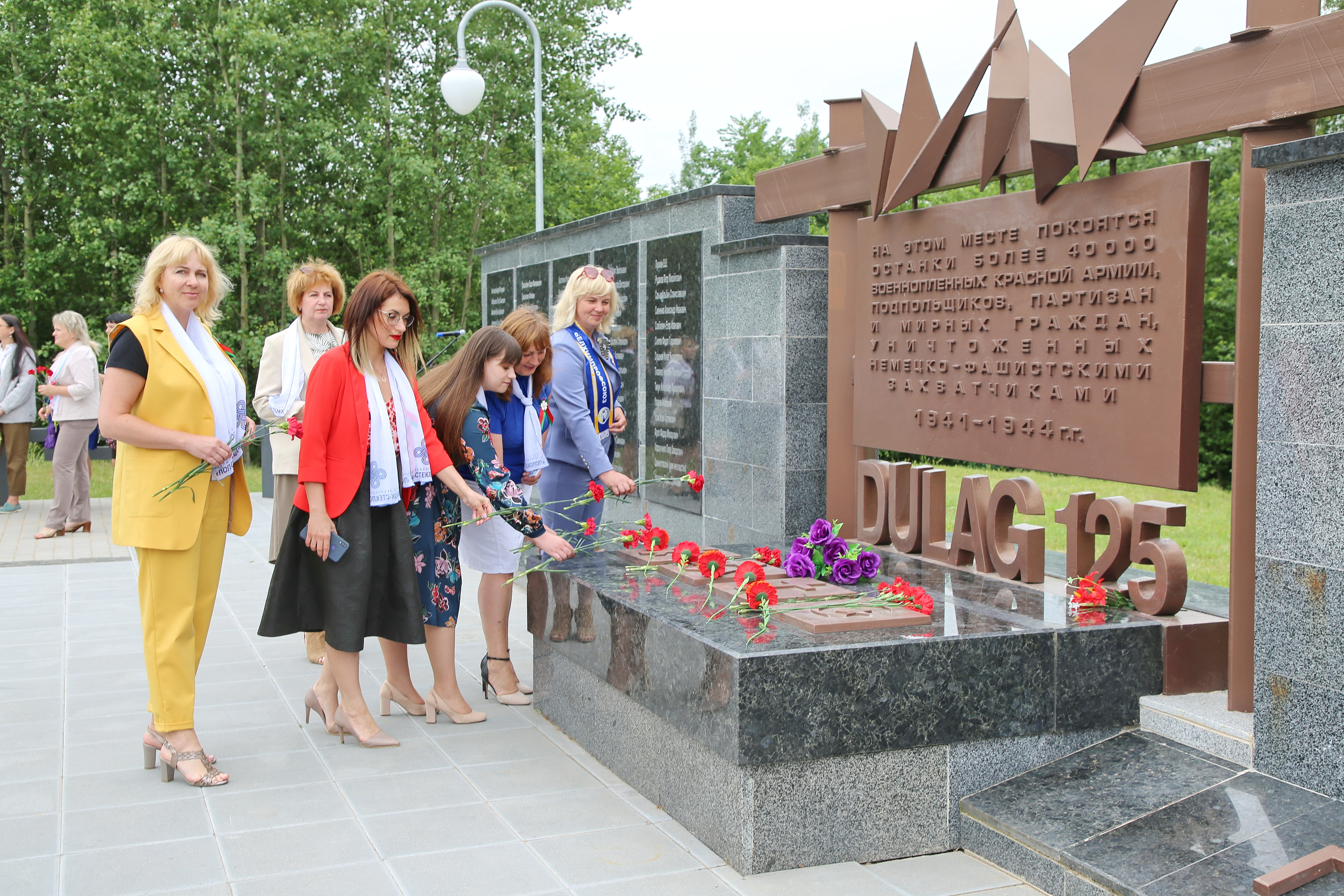 Мемориал сегодня